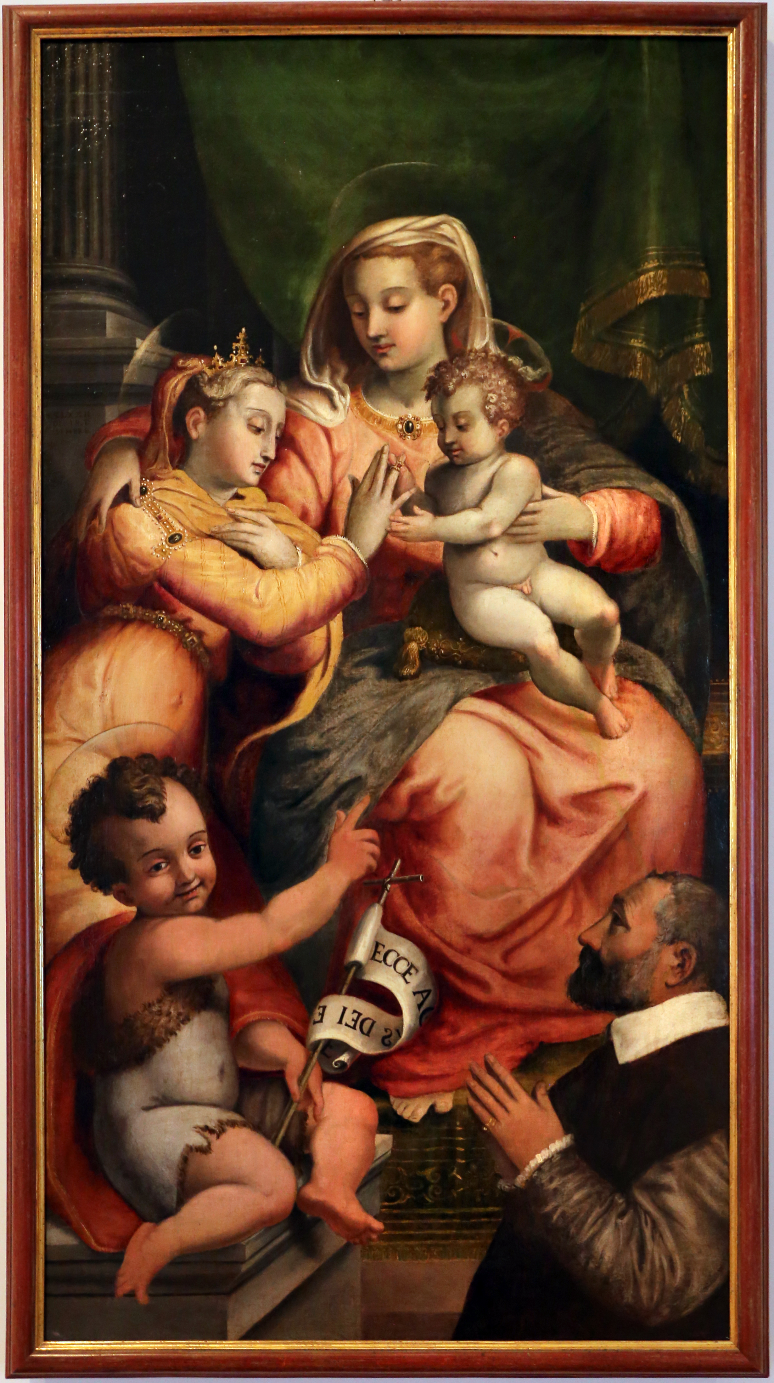 chiesa di San Giacomo Apostolo dei Domenicani This is a photo of a monument which is part of cultural heritage of Italy.